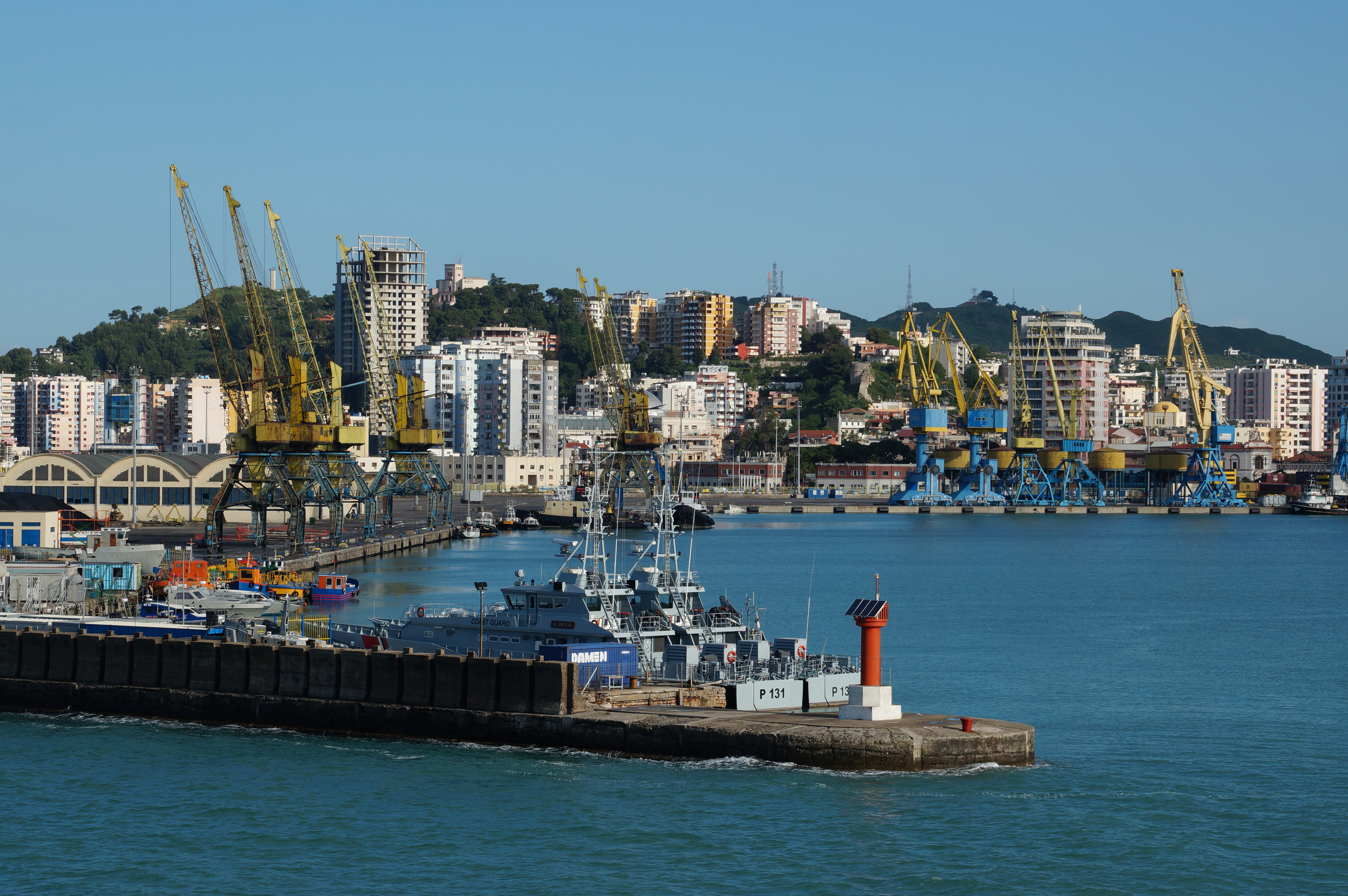 Entering Durrës harbor